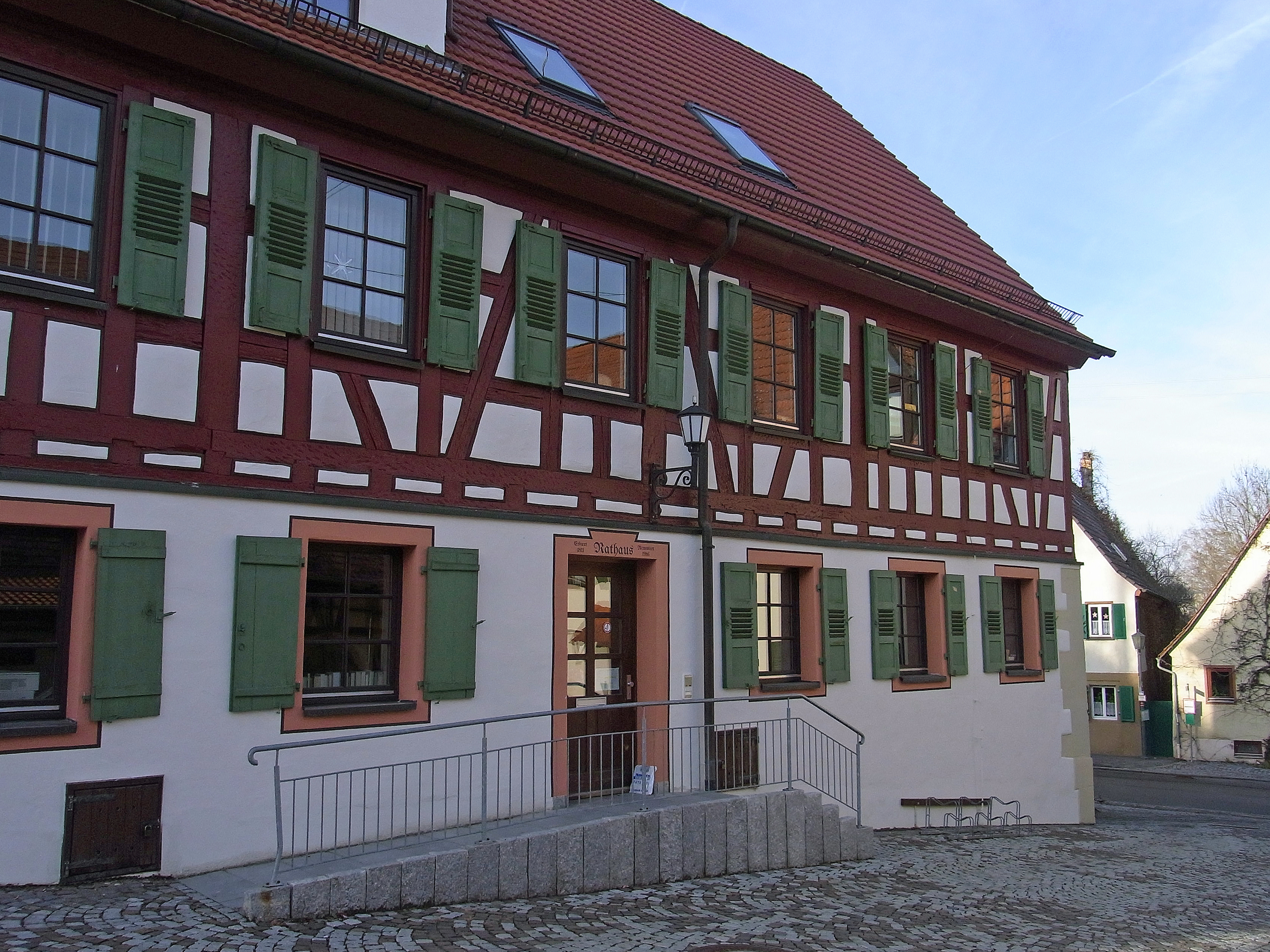 Ammerbuch-Pfäffingen: Rathaus, Teil des alten Schlosses